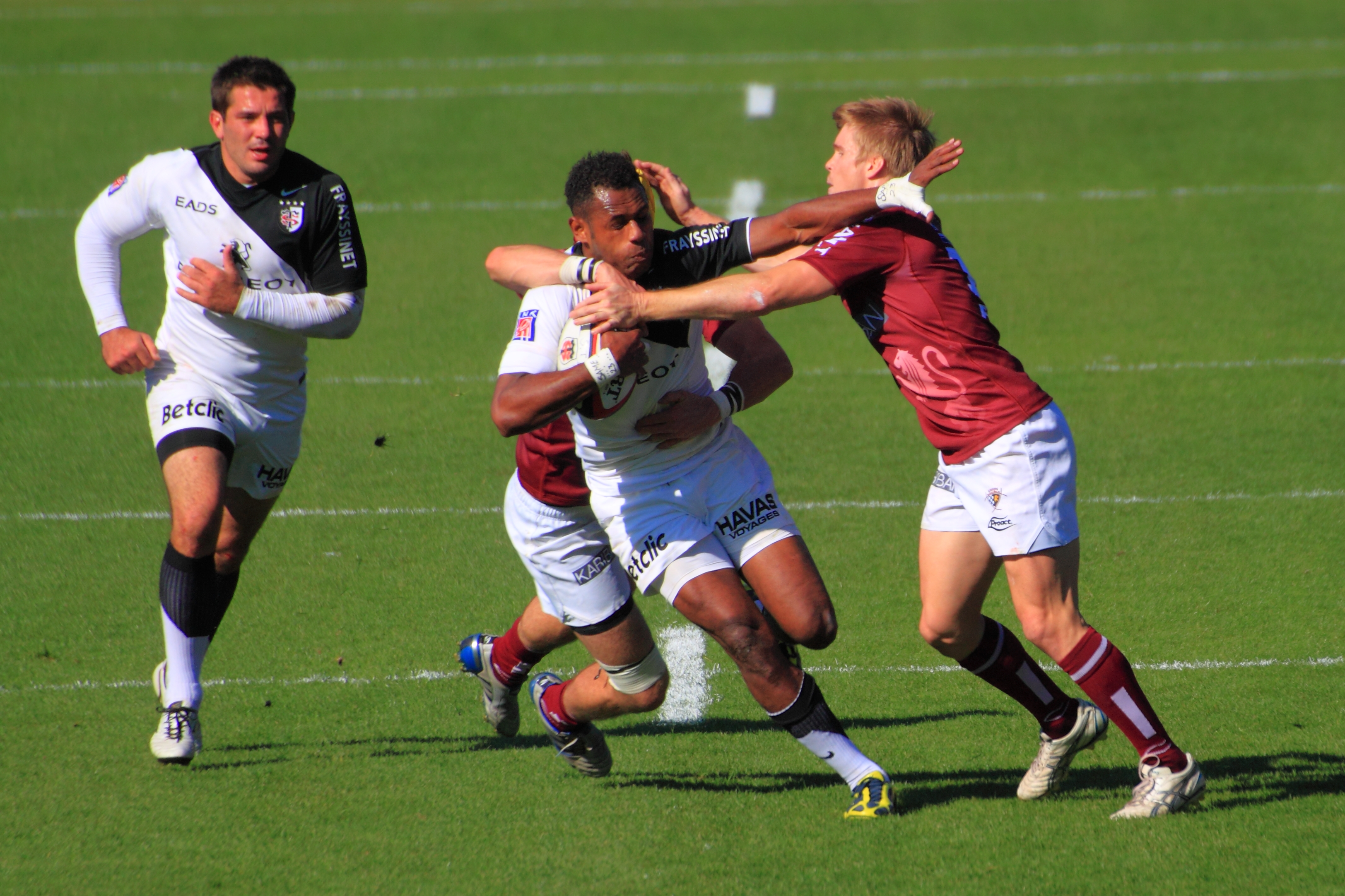 Timoci Matanavu échappant à un plaquage lors de la rencontre de top 14 Stade toulousain vs Union Bordeaux Bègles du 22 octobre 2011